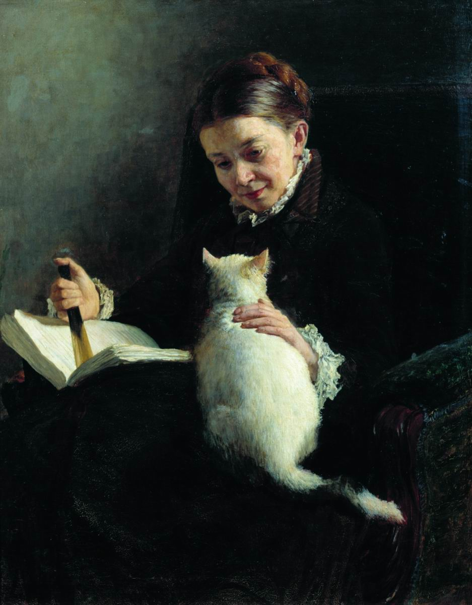 Елизавета Платоновна Ярошенко (в 1-м браке Шлиттер, во 2-м браке Ярошенко; 1850—после 1915), супруга талантливого химика, инженера Василия Александровича Ярошенко (1848—после 1915)